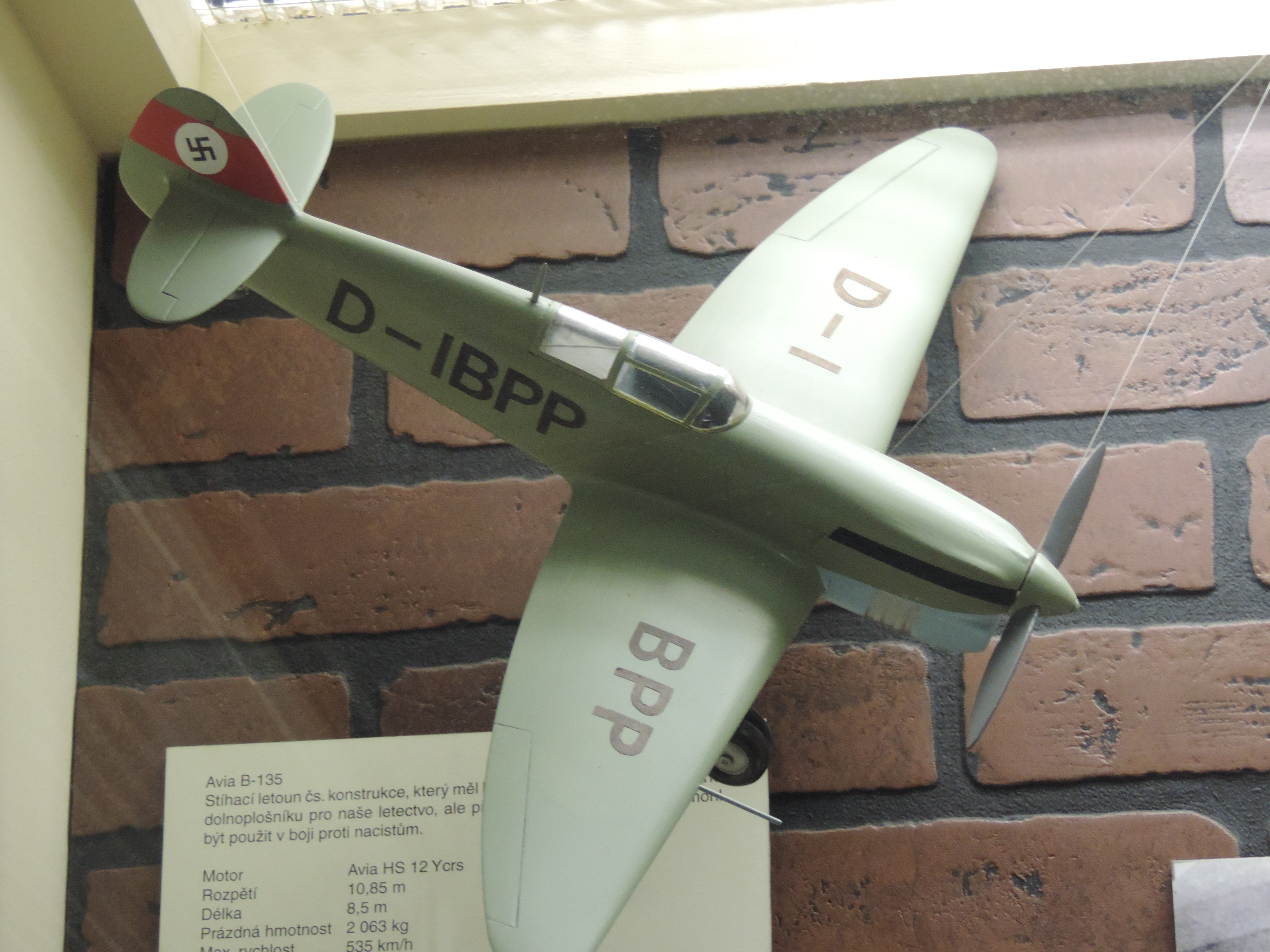 Avia B.135 Modellfoto im Flugzeugmuseum Kbely